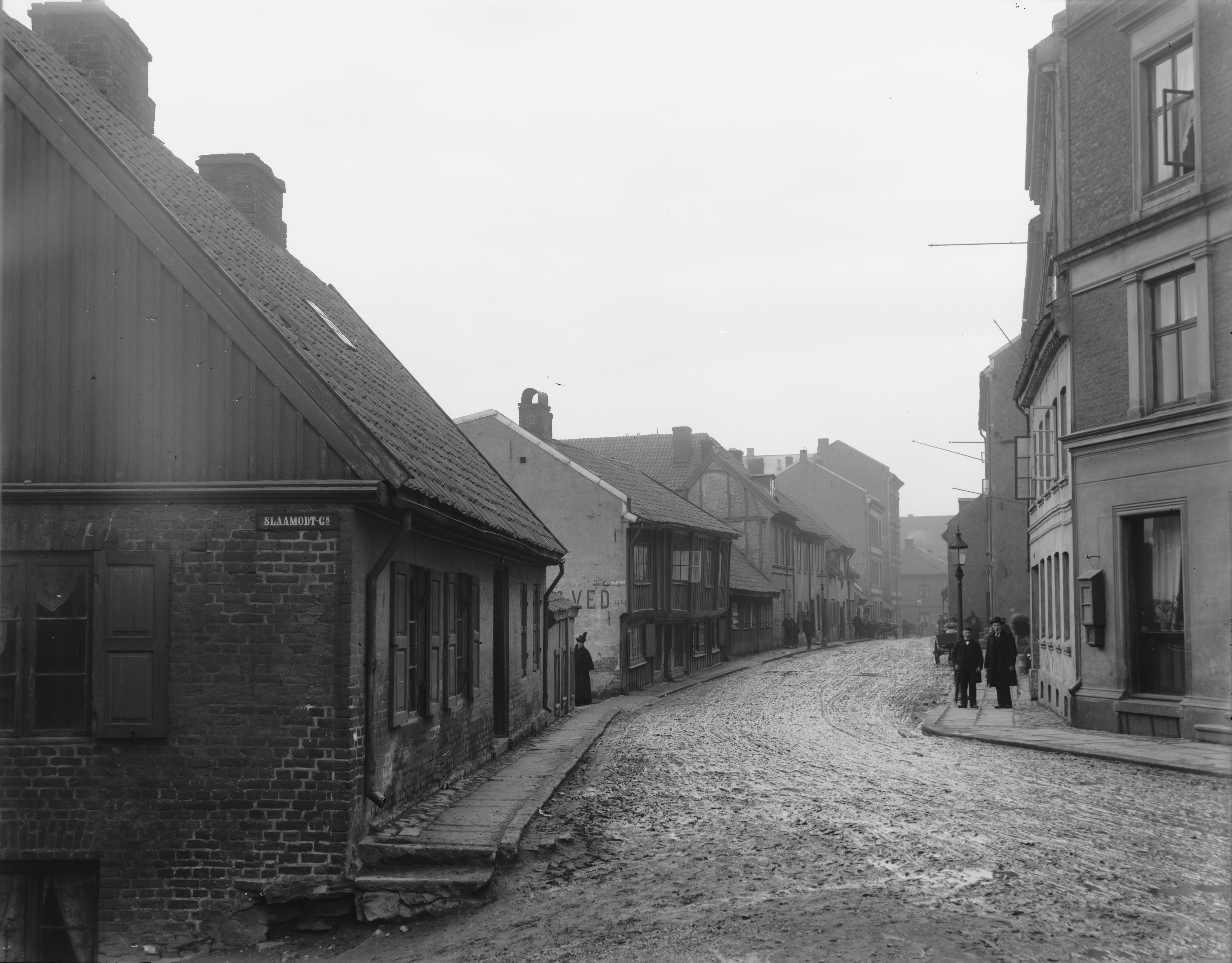 Påskrift konvolutt: B-1 Oslo. Christian Krohgs gt. fra Slåmotgangen nedover. [Riksantikvaren] Sted: Sentrum Kommune: Oslo Fylke: Oslo Tagger: hovedstad by bebyggelse